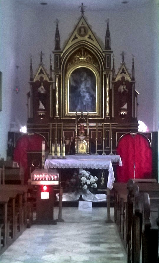 Church of saints Anna